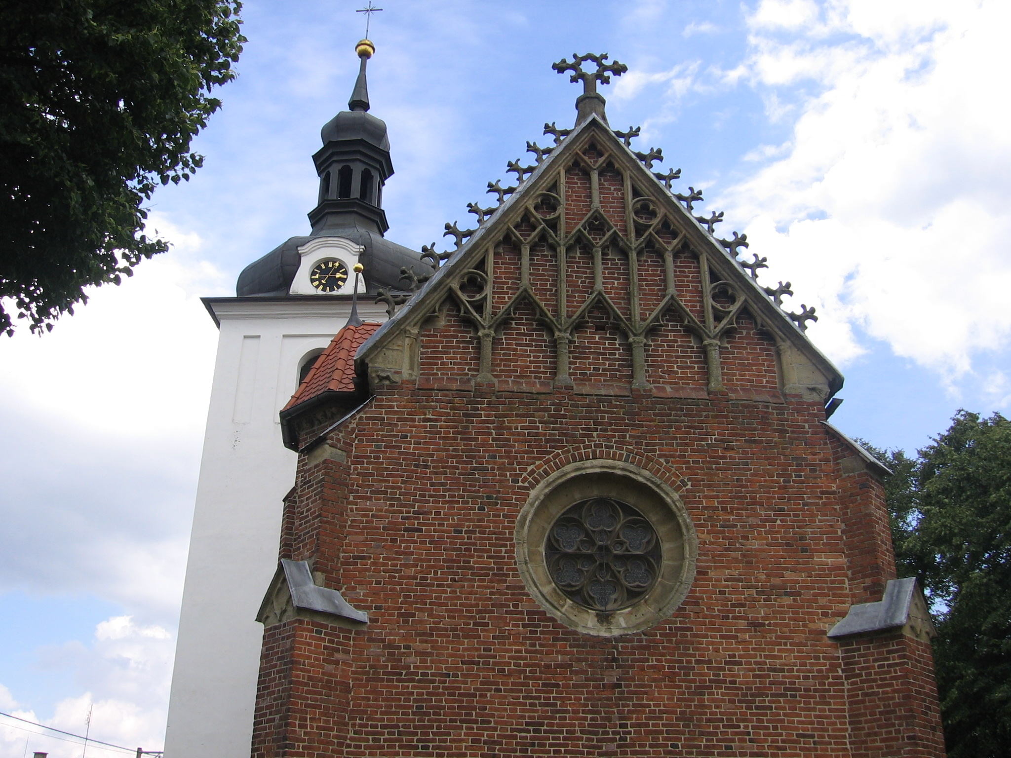 Kostel sv. Mikuláše (Čečovice), okr. Domažlice